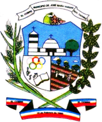 Escudo del municipio José María Vargas del estado Táchira y de su capital El Cobre, en formato PNG. -En proceso de vectorización